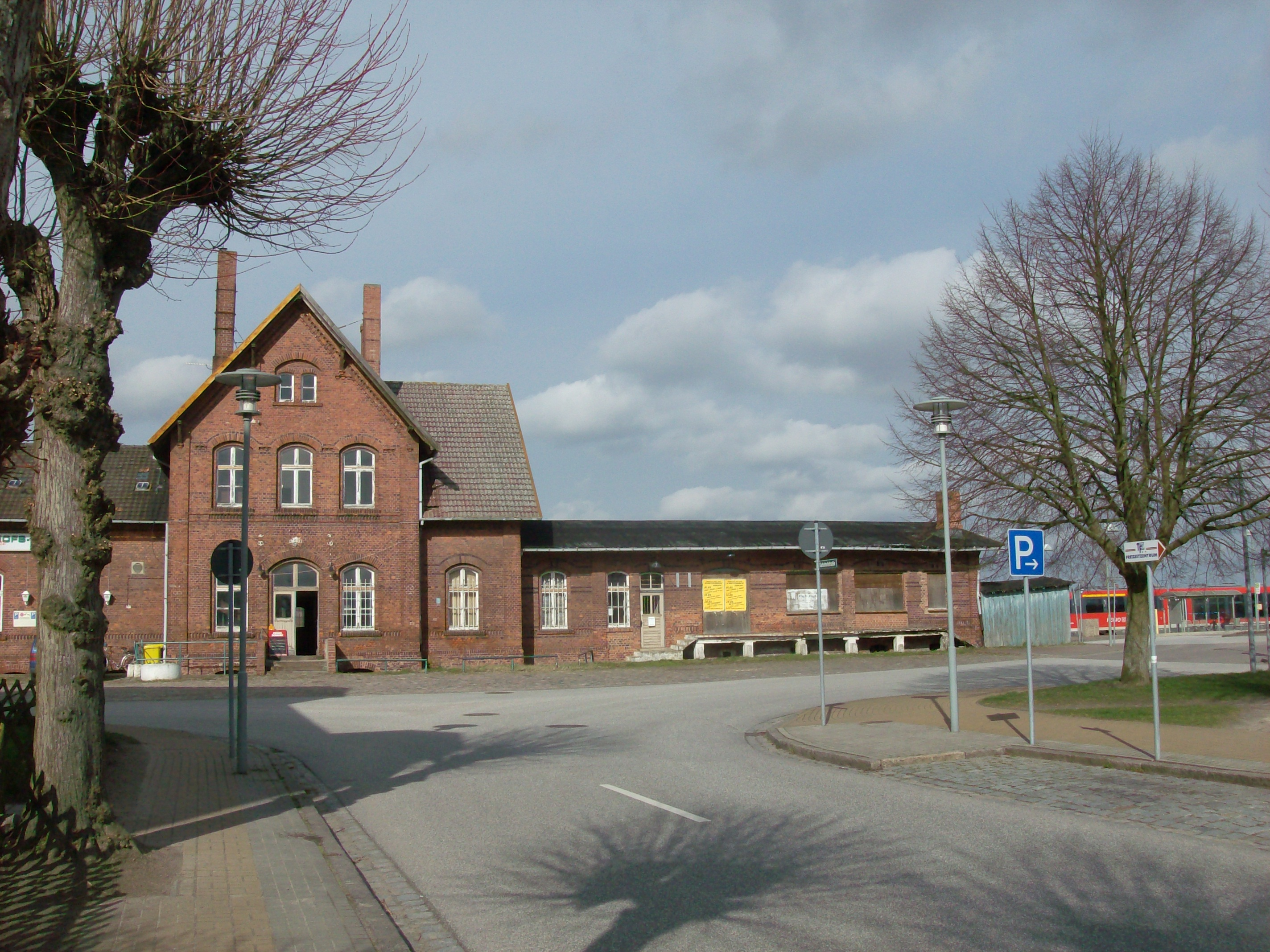 Bahnhof Tessin, denkmalgeschütztes Empfangsgebäude